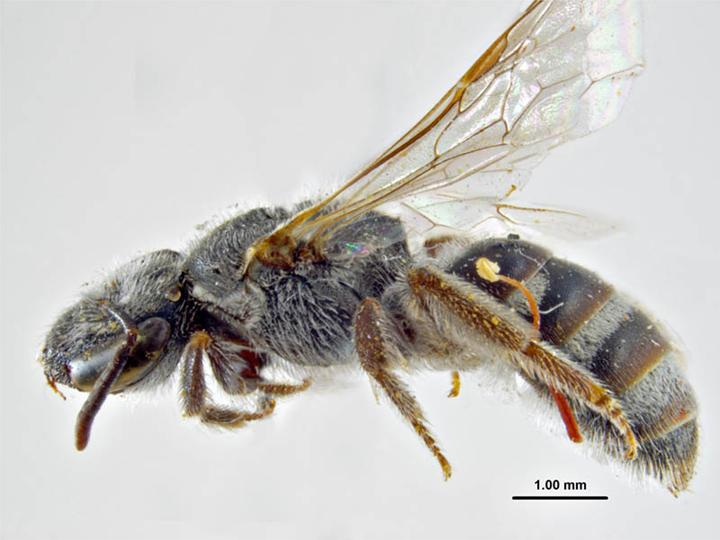 Lasioglossum chapmani female